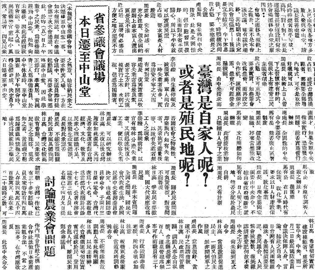 中文（台灣）: 民報有關臺灣省參議會1946年5月5日會議內容之報導